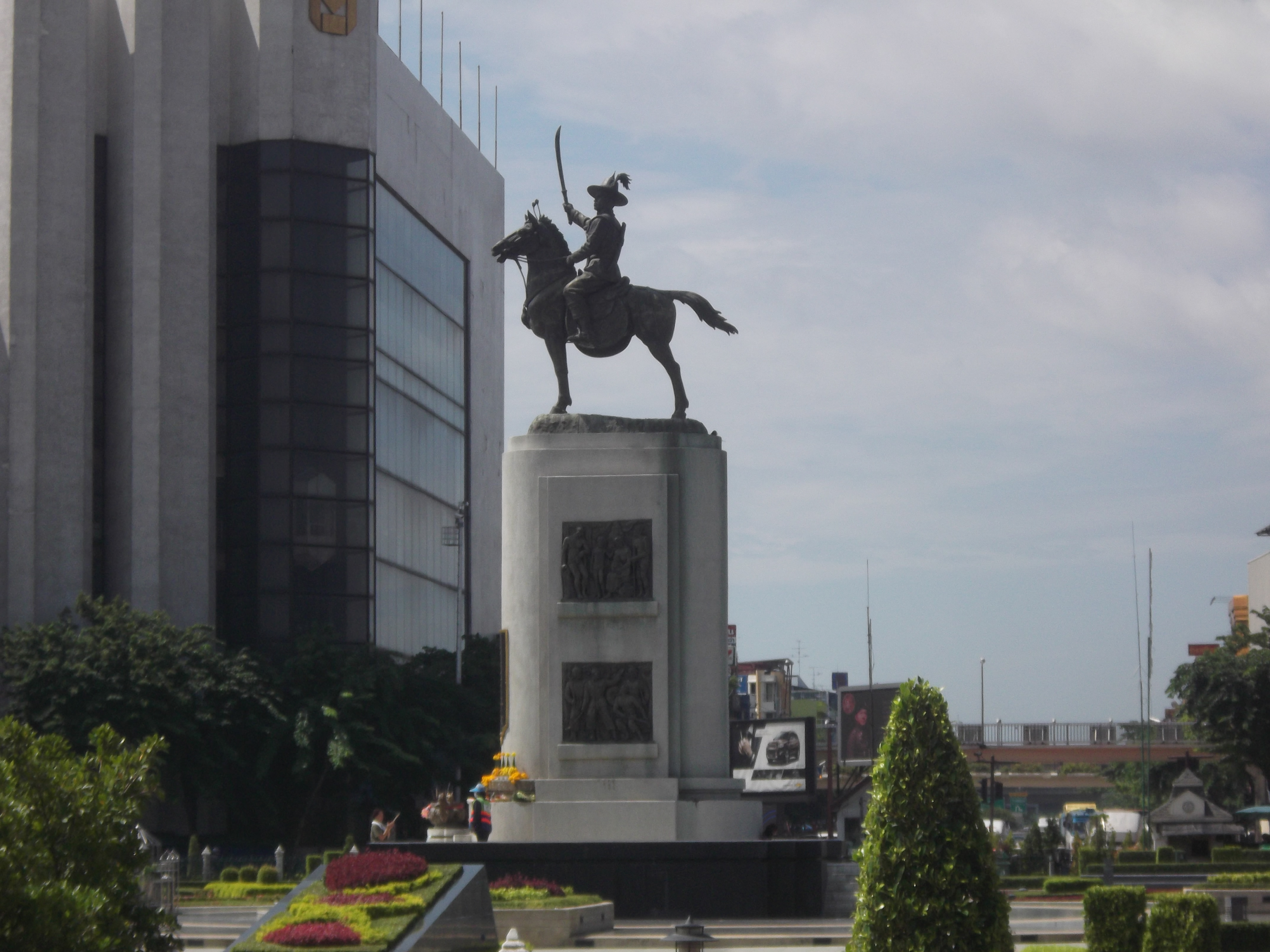 พระบรมราชานุสาวรีย์สมเด็จพระเจ้ากรุงธนบุรีและวงเวียนใหญ่